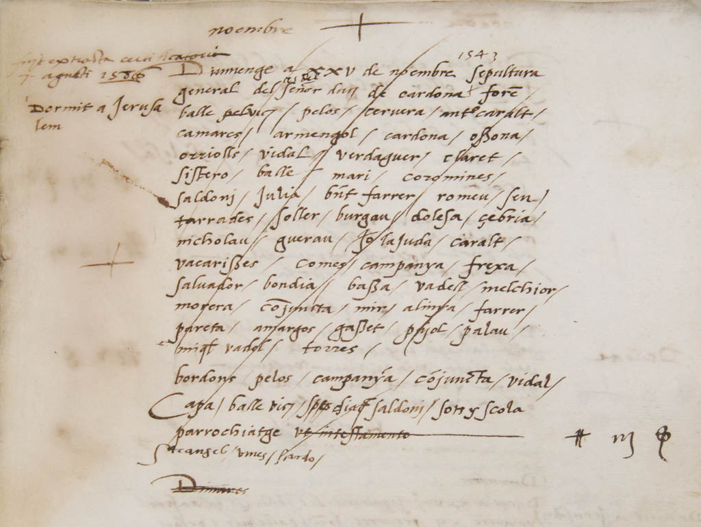 Anotació de l'òbit de Ferran I Joan Ramon Folc duc de Cardona, feligrès del Pi, sepultat el dia 25 de novembre de 1543. APSMP